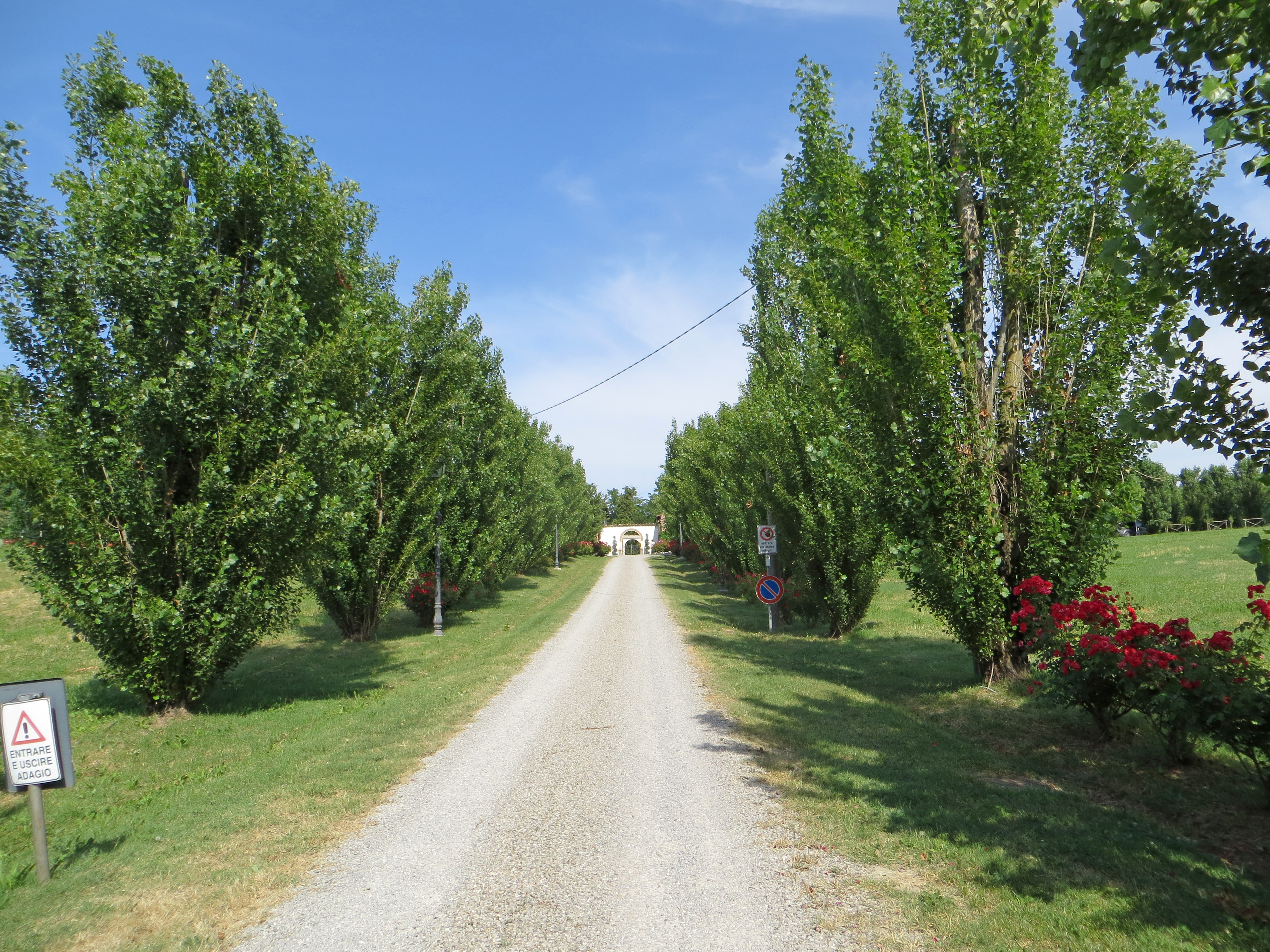 Villa Lalatta Costerbosa (Montechiarugolo) - viale d'ingresso